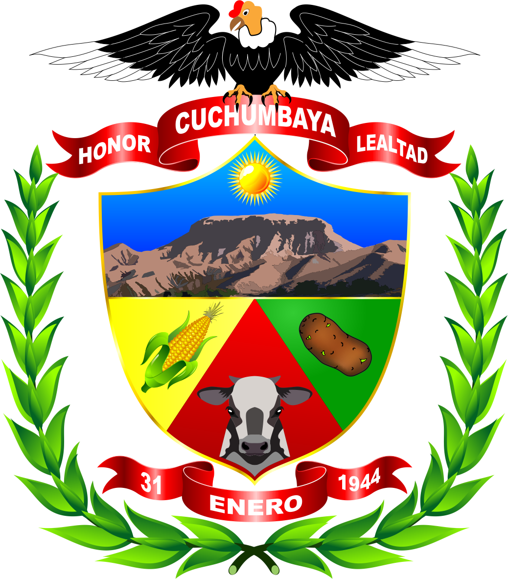 Escudo del Distrito de Cuchumbaya - Provincia de Mariscal Nieto - Región Moquegua